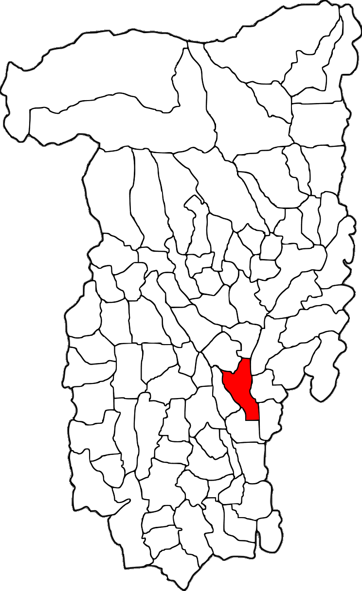 Lage der Gemeinde Ionești im Kreis Vâlcea (RO).